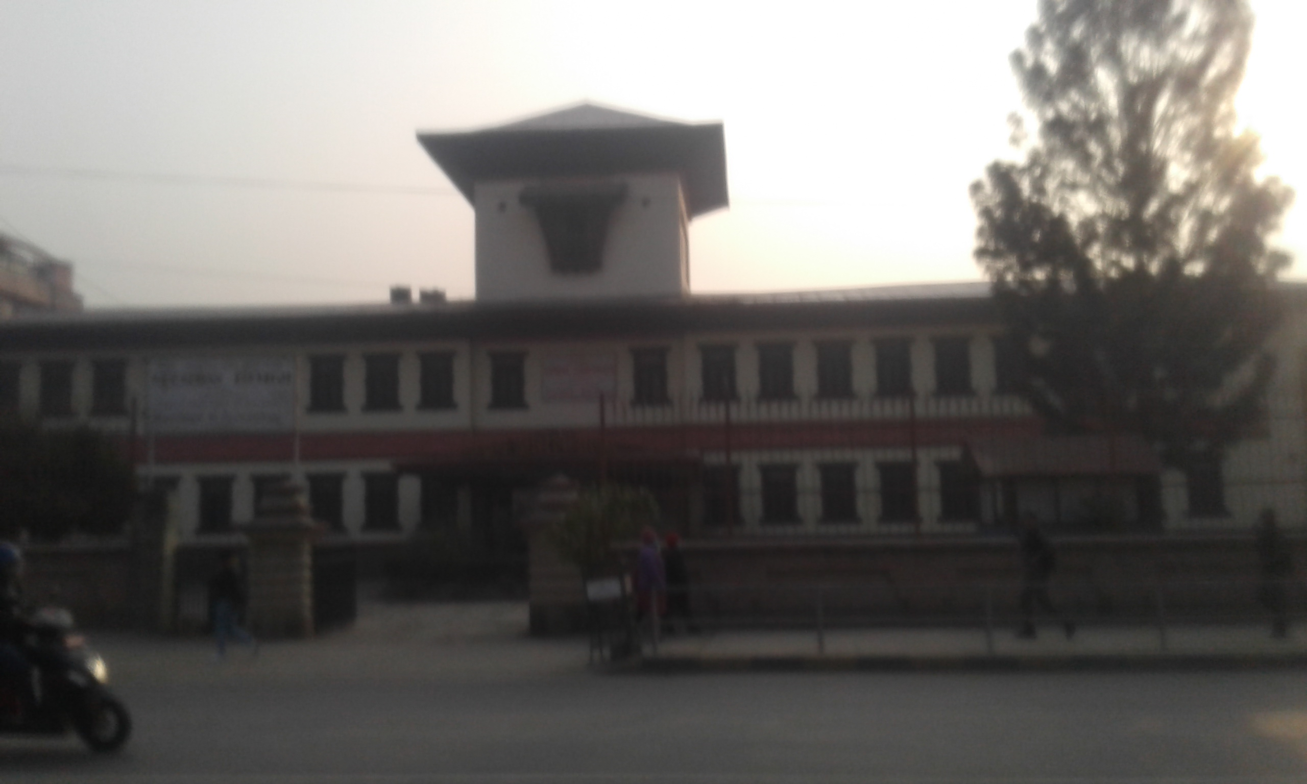 नेपाली: पुरातत्व विभाग नेपाल